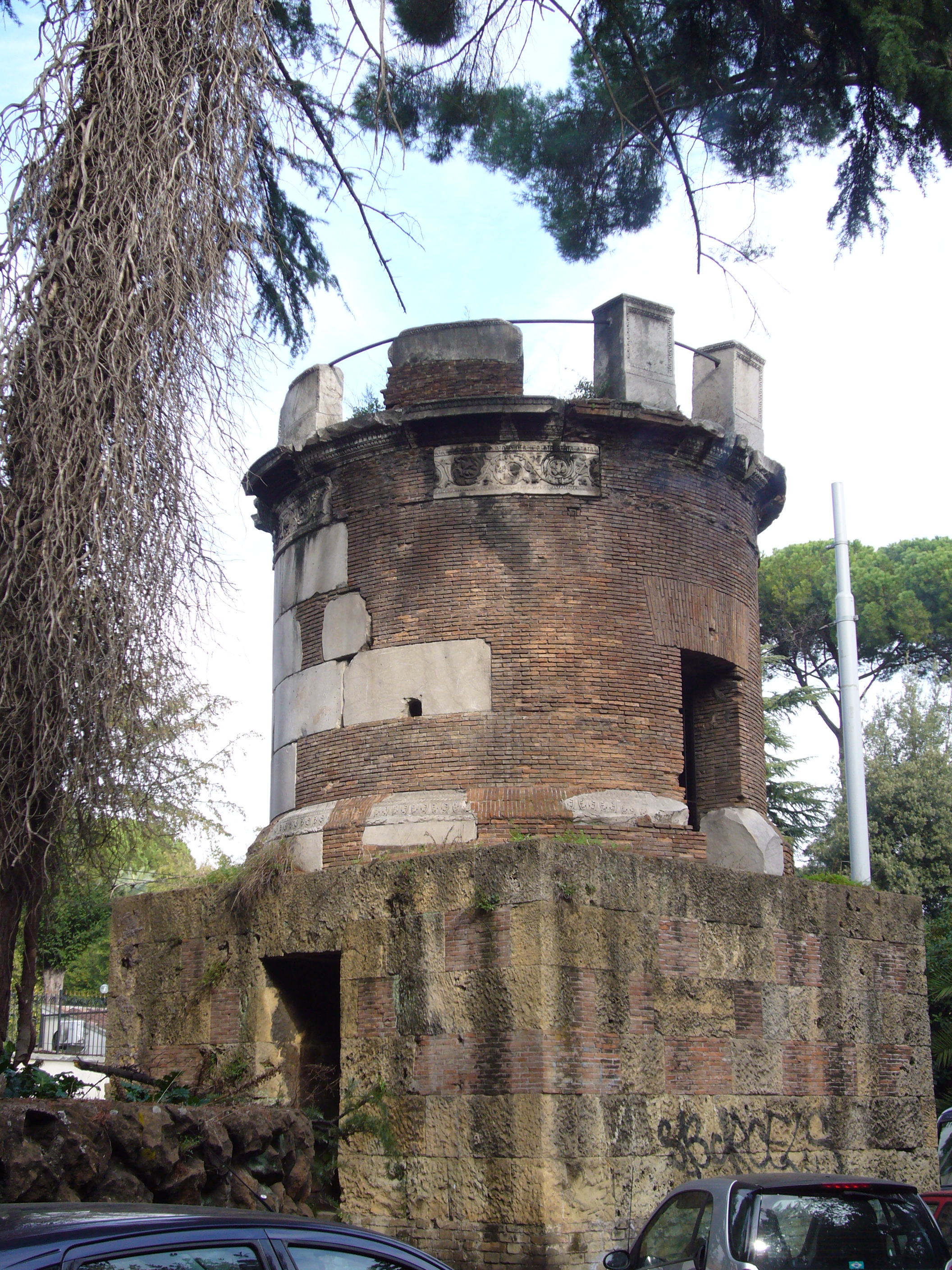 Roma, via Nomentana. Mausoleo rinvenuto da Giacomo Boni a Tor di Quinto, da lui trasferito a Villa Blanc sulla via Nomentana, e qui successivamente rimasto isolato per l'allargamento della strada.